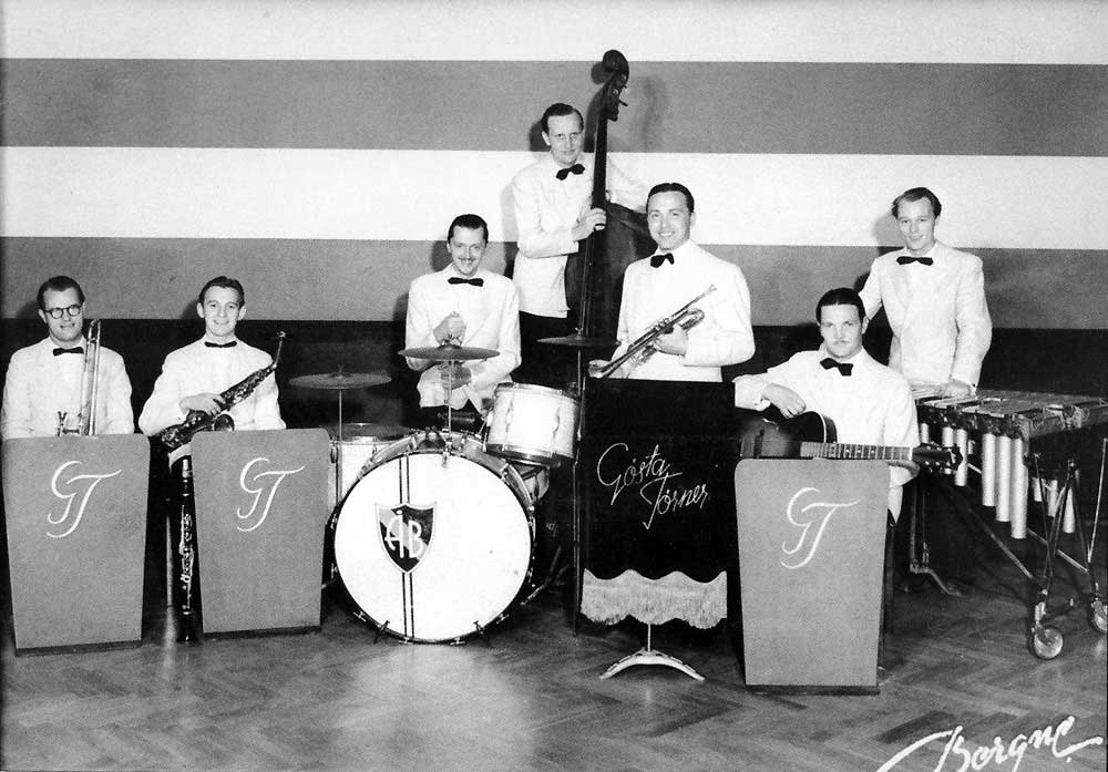 Gösta Törner med orkester (inkluderande bl a Folke Eriksberg, gitarr)